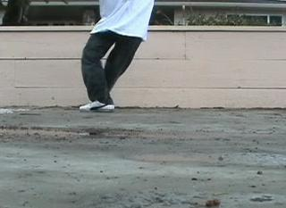 Ramune C-Walking